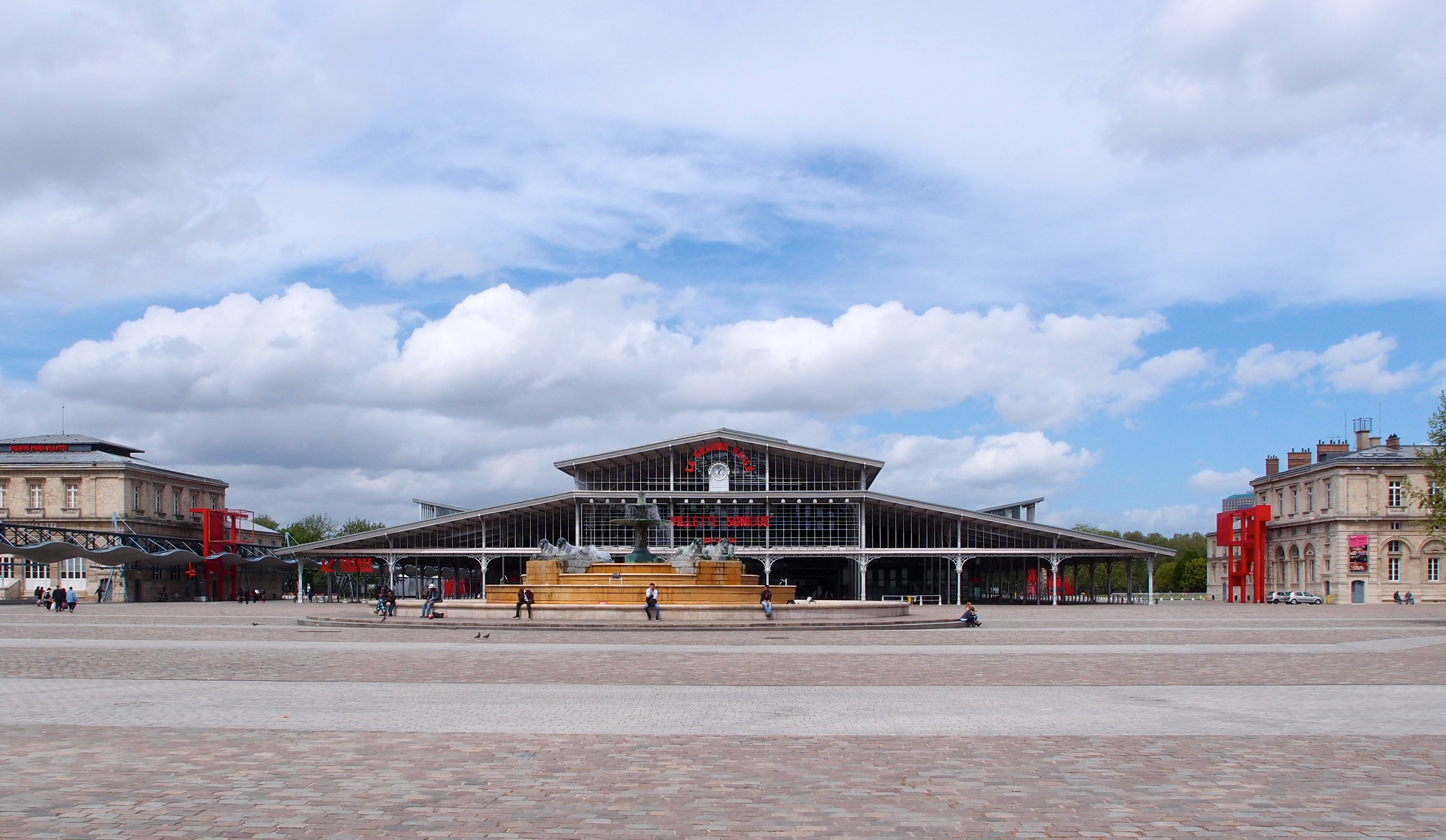 Grande halle de La Villette